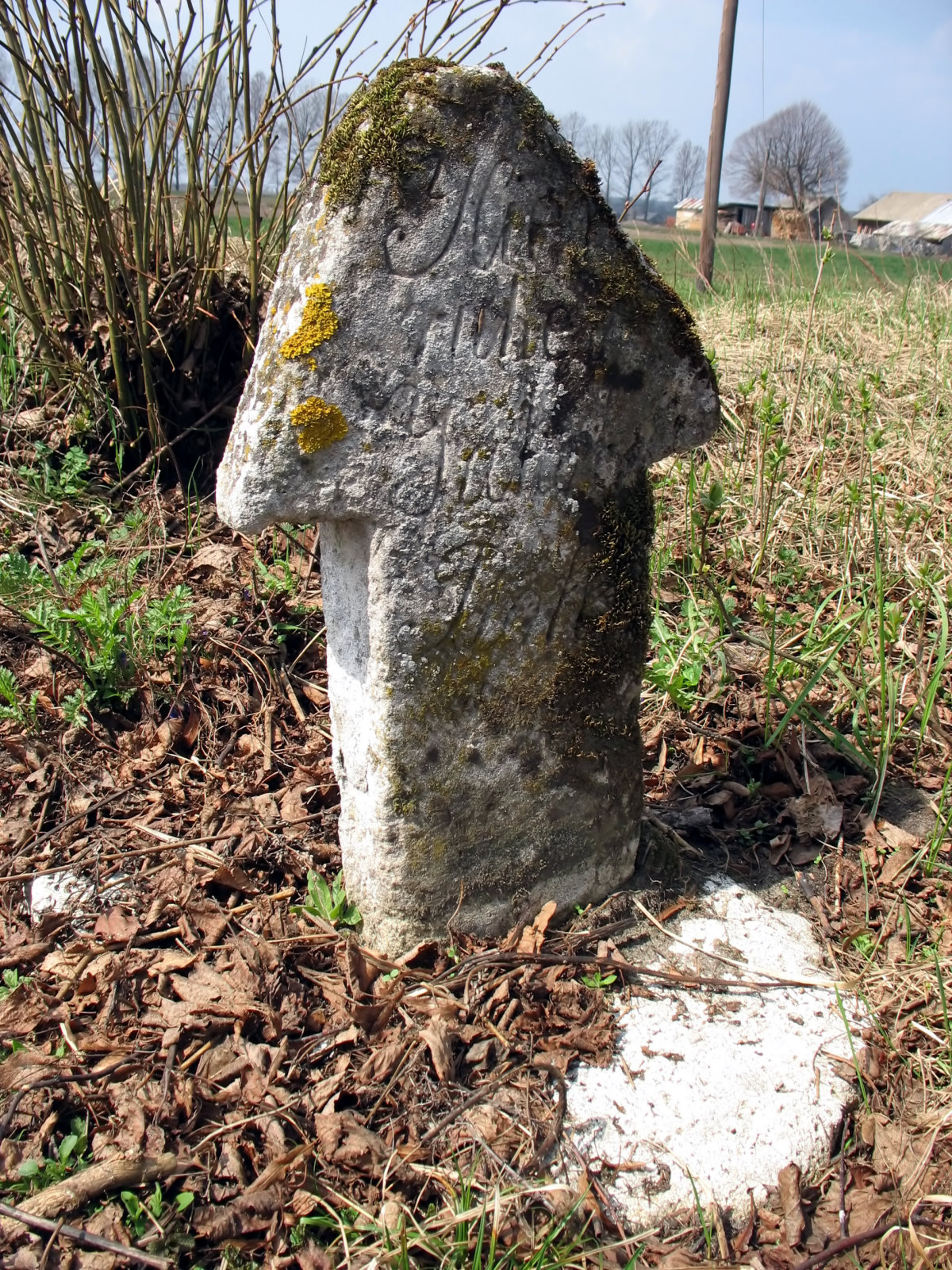 Nowe Brusno (Polska) - ewangelicki nagrobek mieszkańca DeutschBach